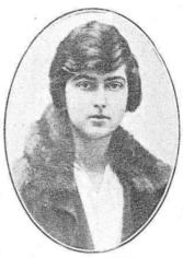 Ritratto di Iolanda Margherita di Savoia, figlia di Vittorio Emanuele III di Savoia e di Elena del Montenegro.